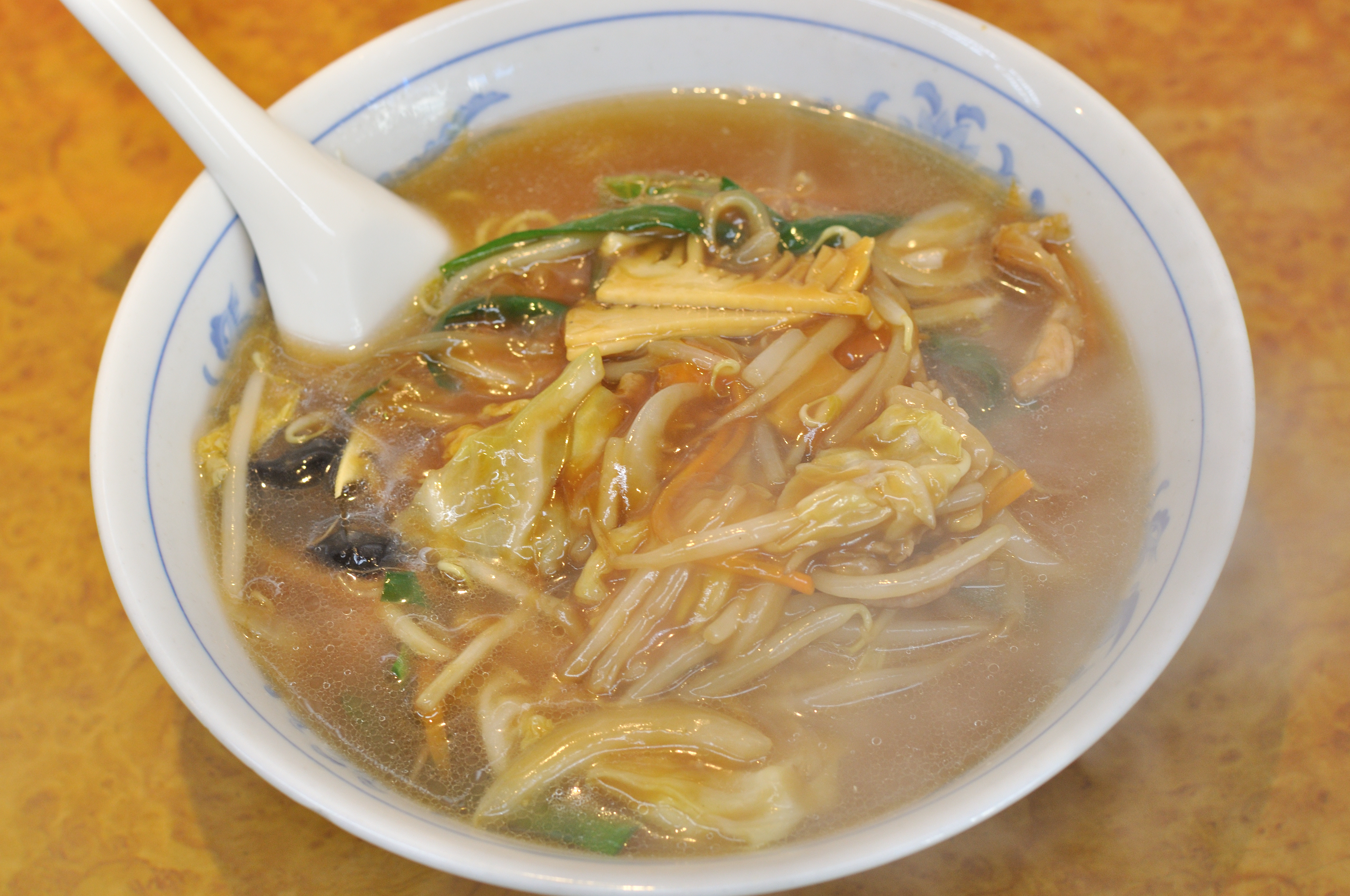 大船「石狩亭」の生嗎麺(サンマーメン)